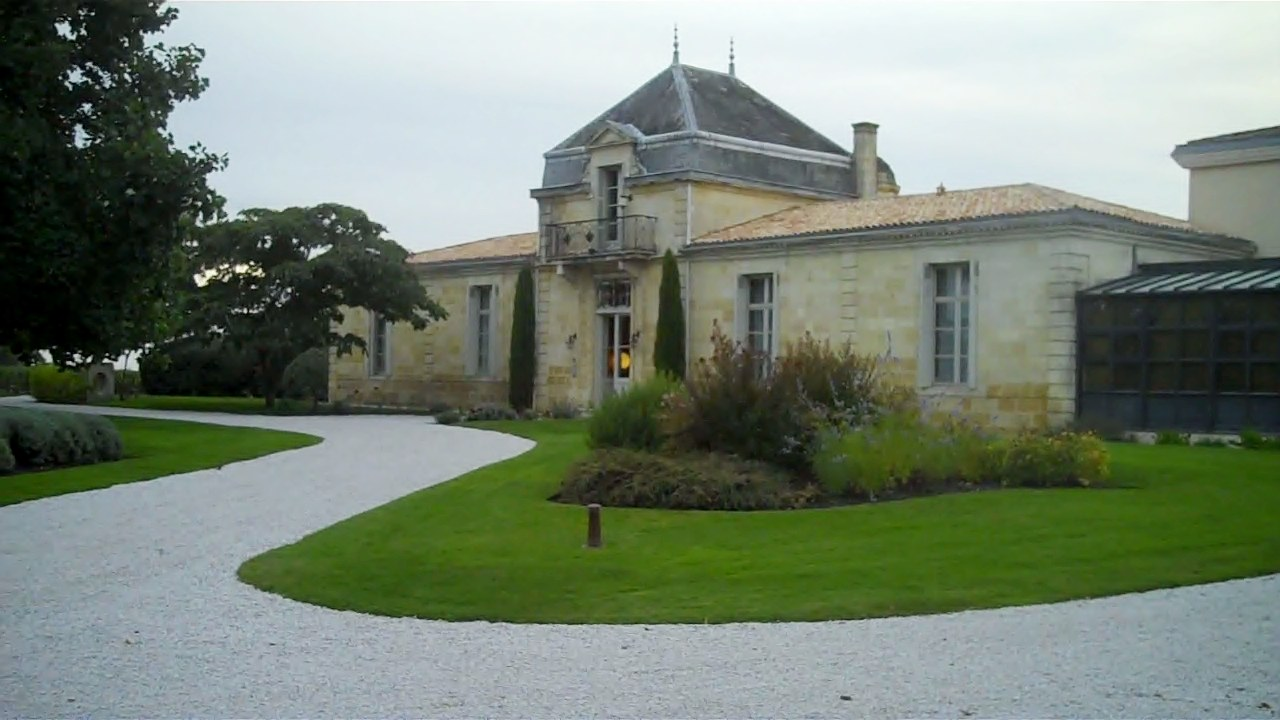 Le Relais & Châteaux Cordeillan-Bages